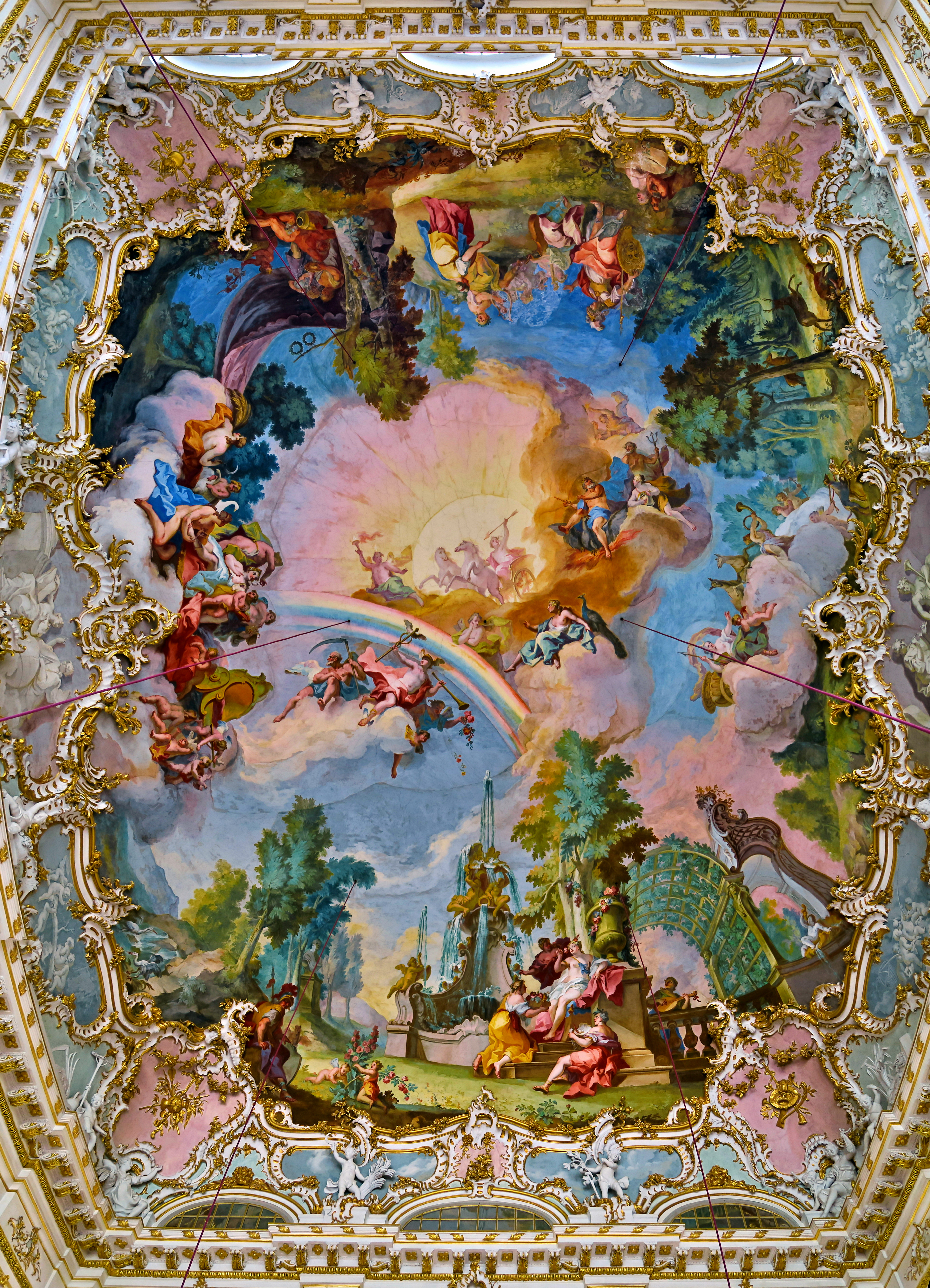 Deutschland, Bayern, München, Schloß Nymphenburg, Steinerner Saal, Deckenfresko von Johann Baptist Zimmermann